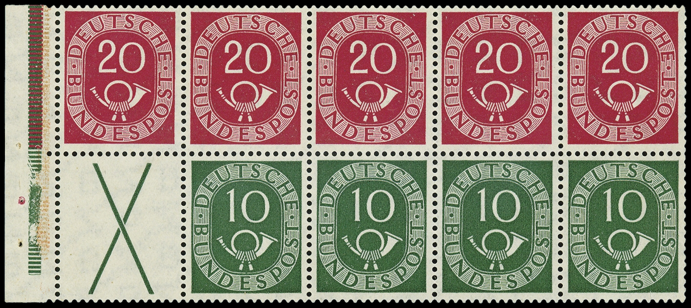 Information: Erstes Markenheftchen der BRD Ausgabepreis: Heftchenpreis: 250 Pfennig First Day of Issue / Erstausgabetag: 30. Oktober 1951 Auflage: 750.000 Entwurf: Druckverfahren: Michel-Katalog-Nr: Ländercode-MiNr: H-Blatt 1